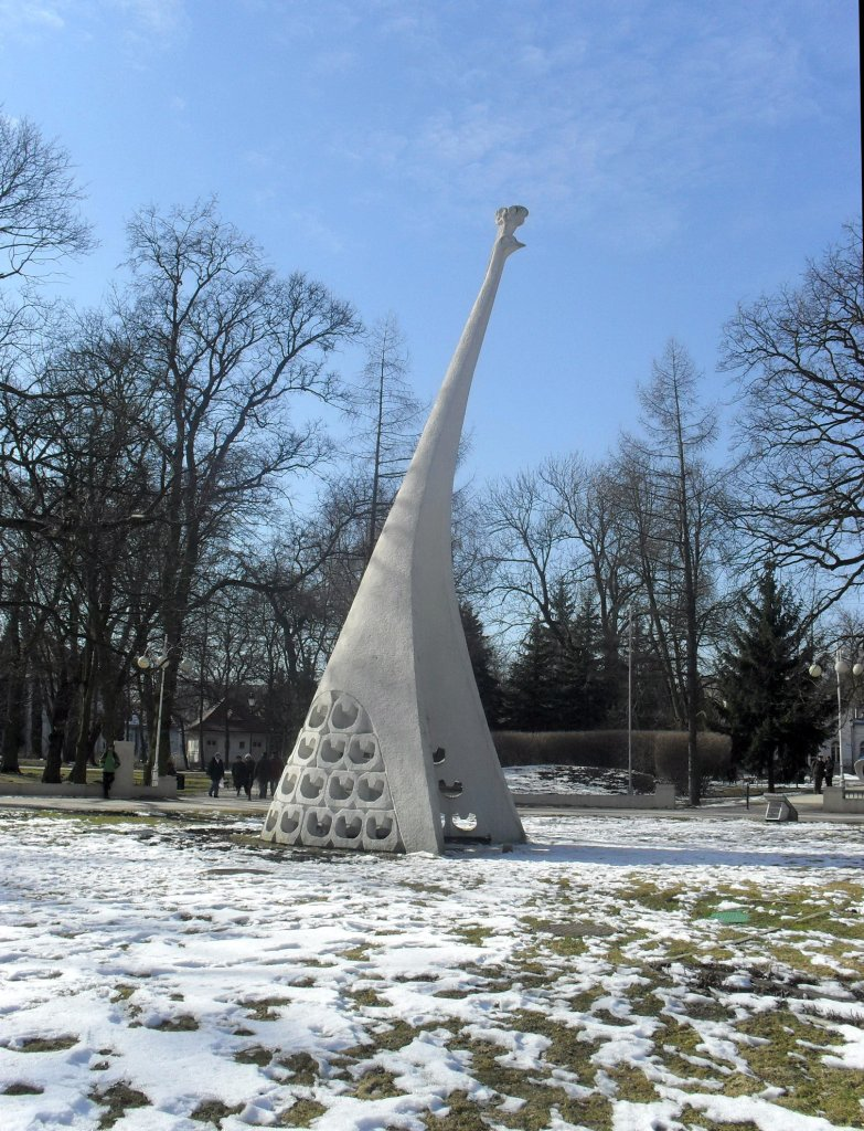 Rzeźba pawia w parku Solankowym w Inowrocławiu